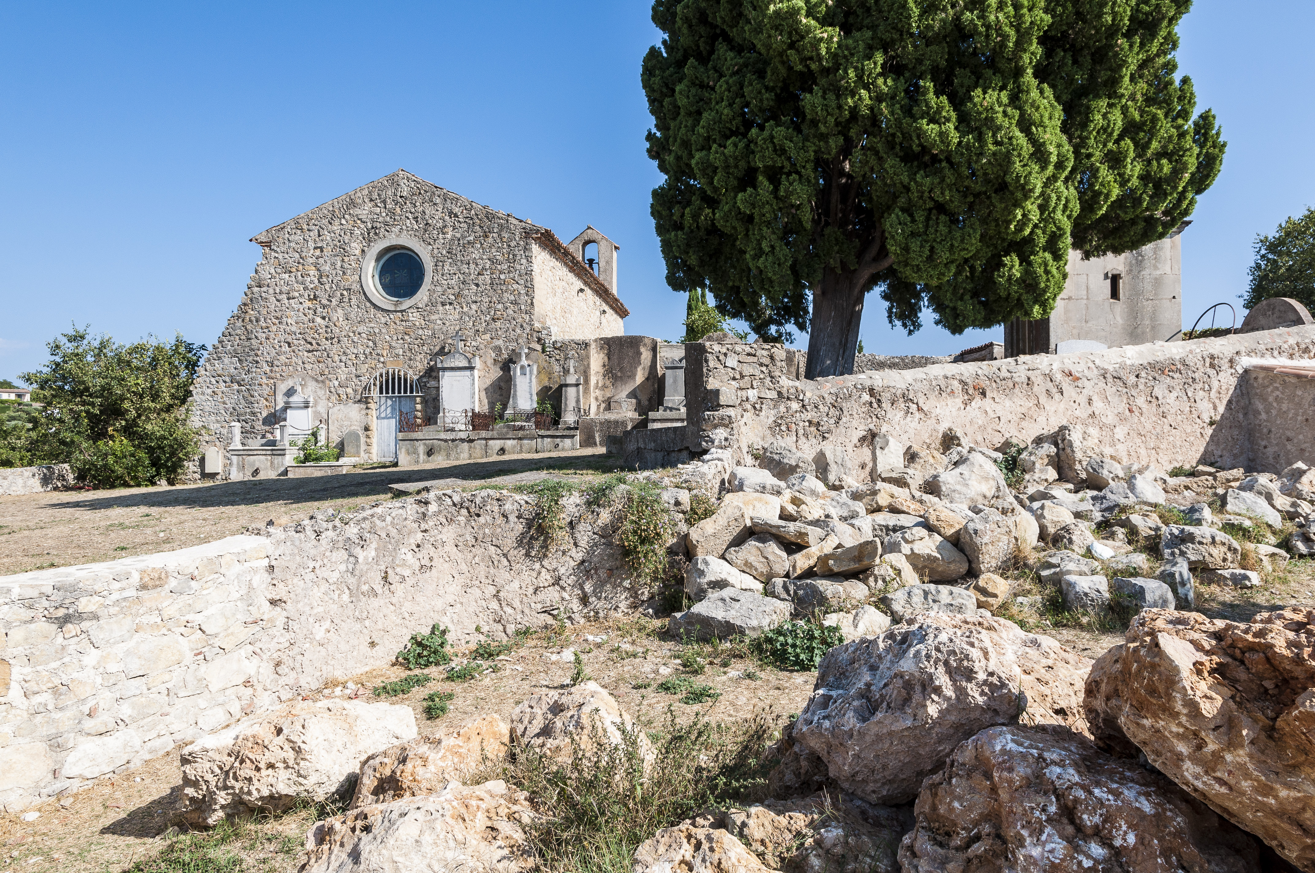 La chapelle Saint-Barthélémy, en haut du village.